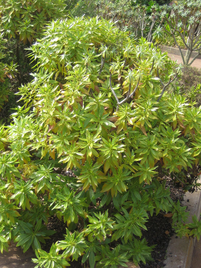 Phyllis nobla en . Canutillo en La Gomera